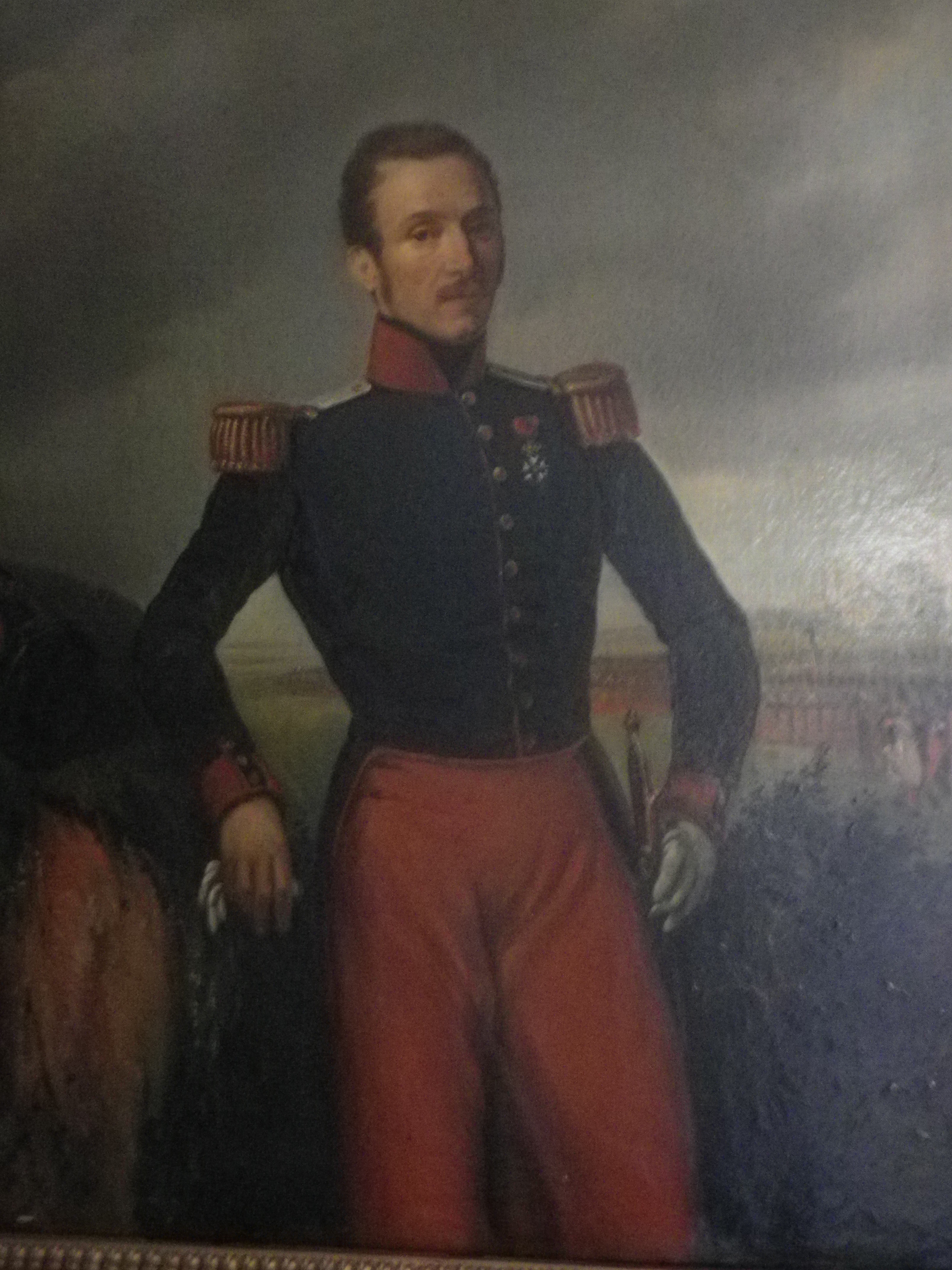 photo d'un tableau de famille